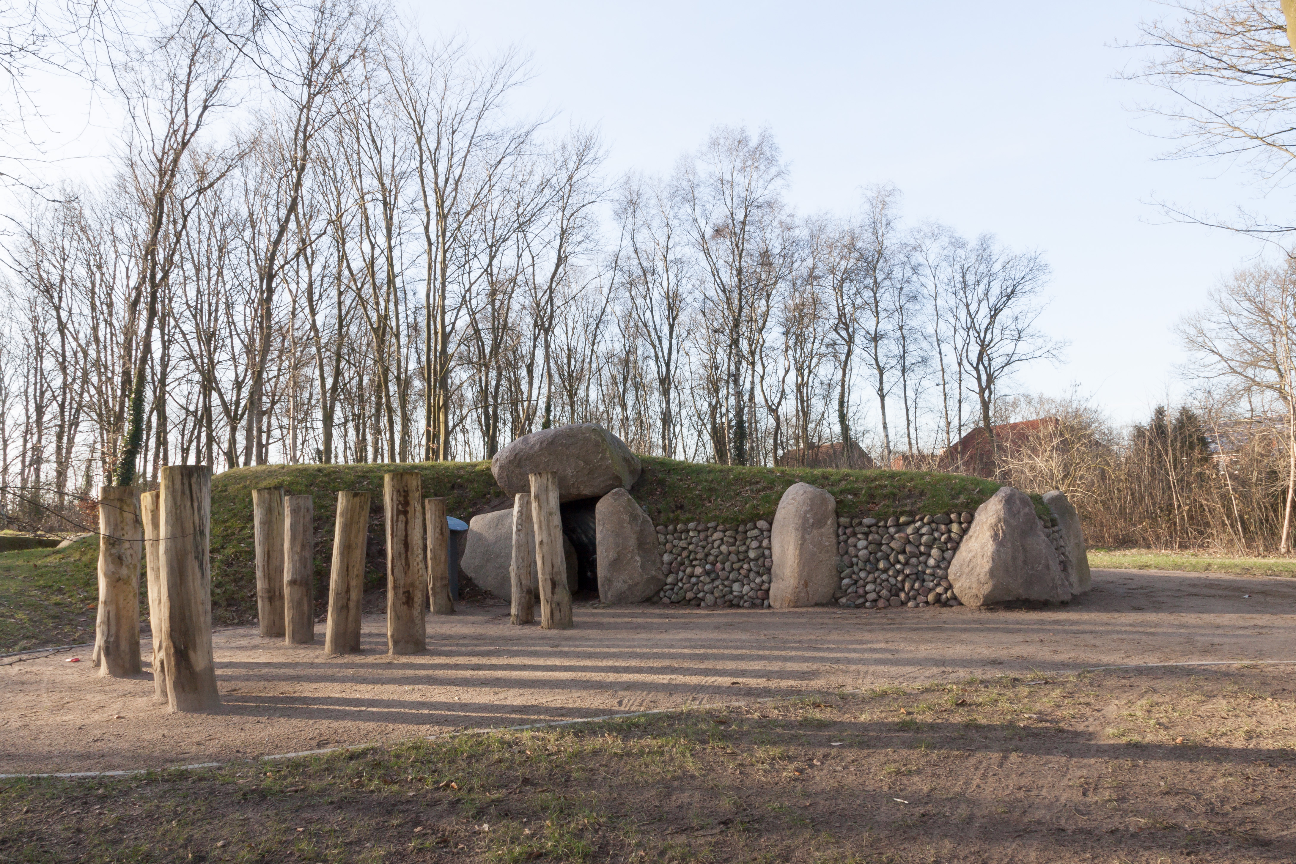 Rekonstruierter Grabhügel beim Großsteingrab Tannenhausen.